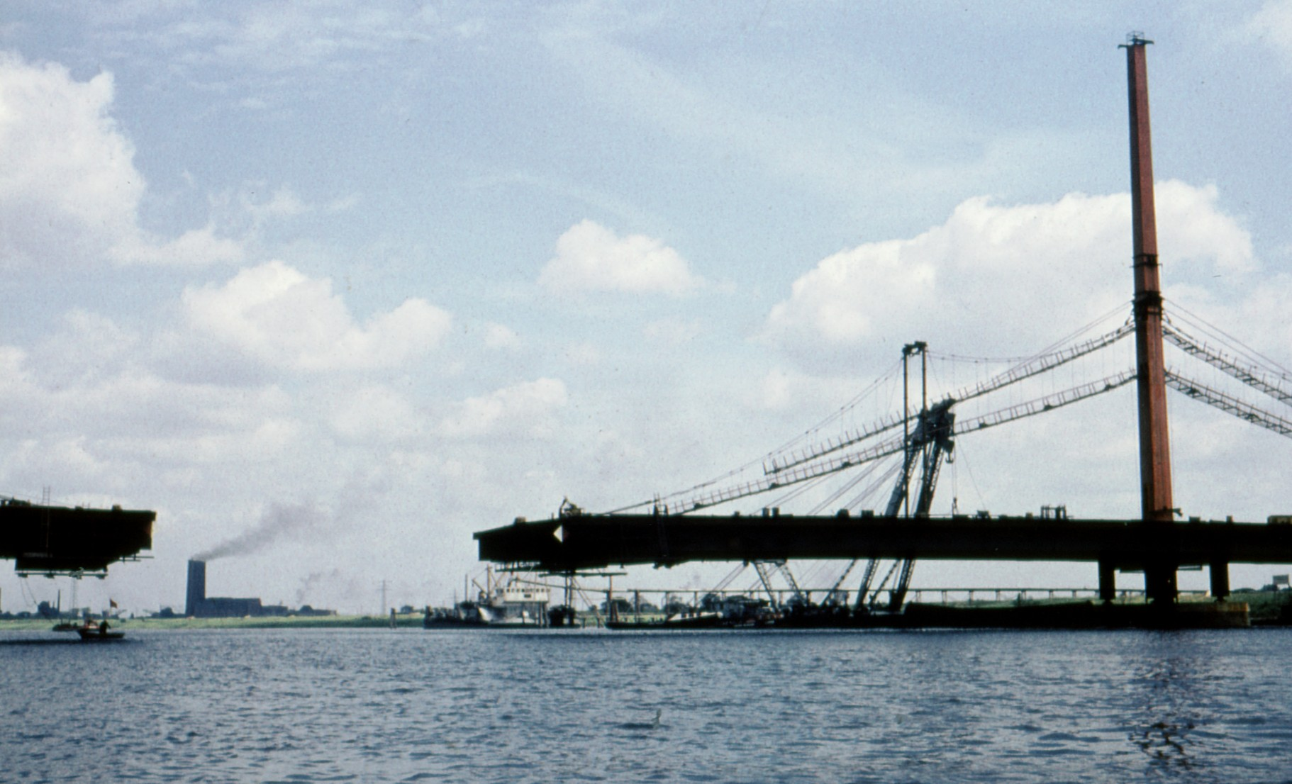 Die Moorfleetbrücke bei Hamburg im Bau 1961. Die Brücke überquert im Zuge der Bundesautobahn 1 die Norderelbe, die dort die Grenze zwischen den Hamburger Stadtteilen Wilhelmsburg und Moorfleet darstellt.